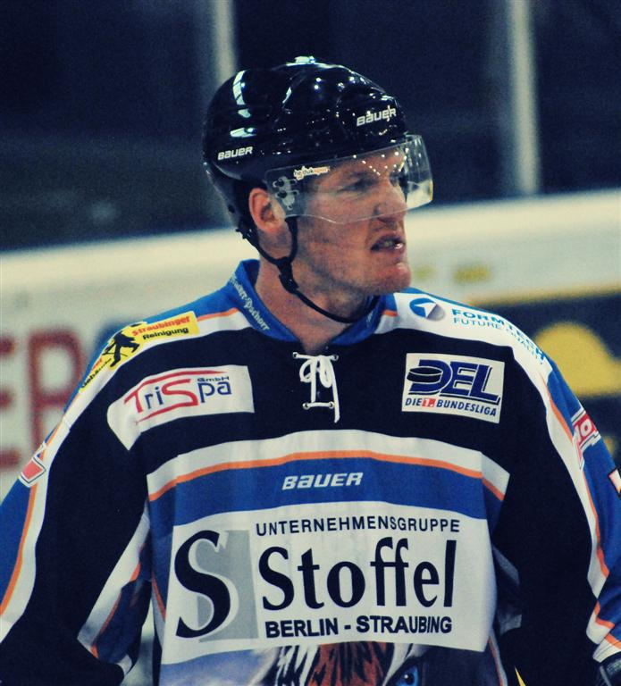 Lee Goren